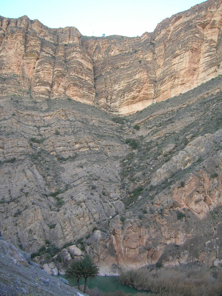 Despeñadero en las inmediaciones de Ojós, España, Murcia, a la salida del azud de Ojós. Cliffs in the vicinity of Ojos, Murcia, Spain. Own picture, given to PD.